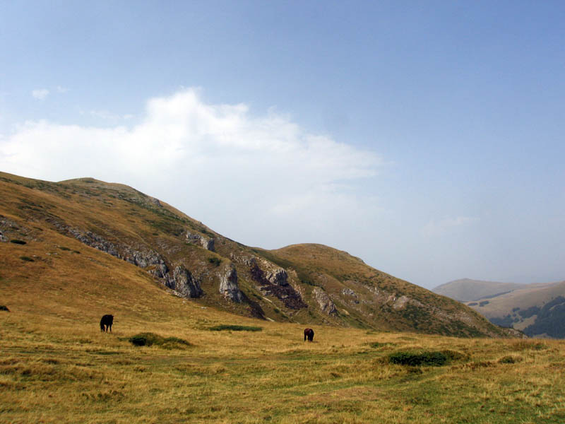 Svatovsko groblje na Biogradskoj gori